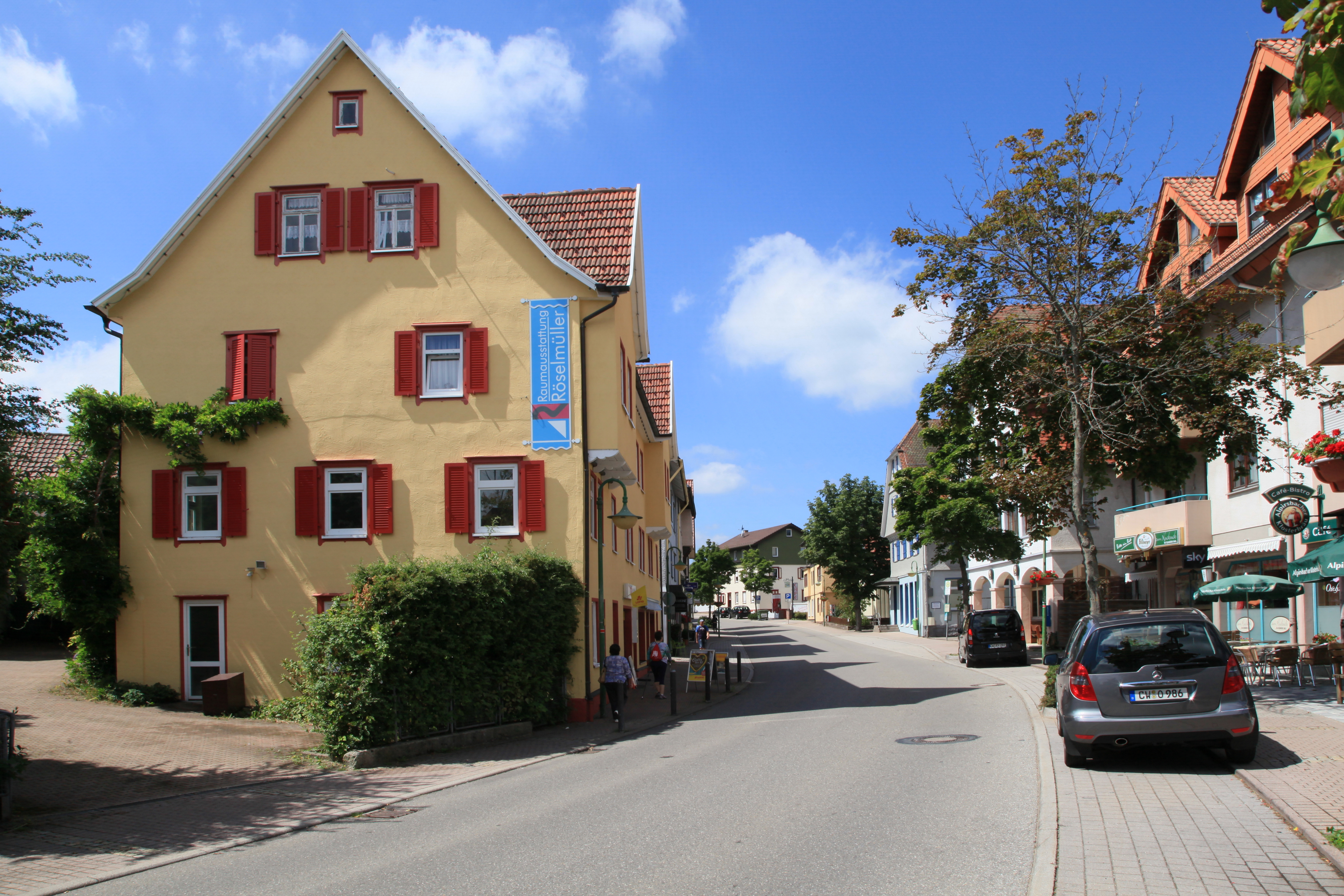 Liebenzeller Straße in Schömberg (Landkreis Calw)